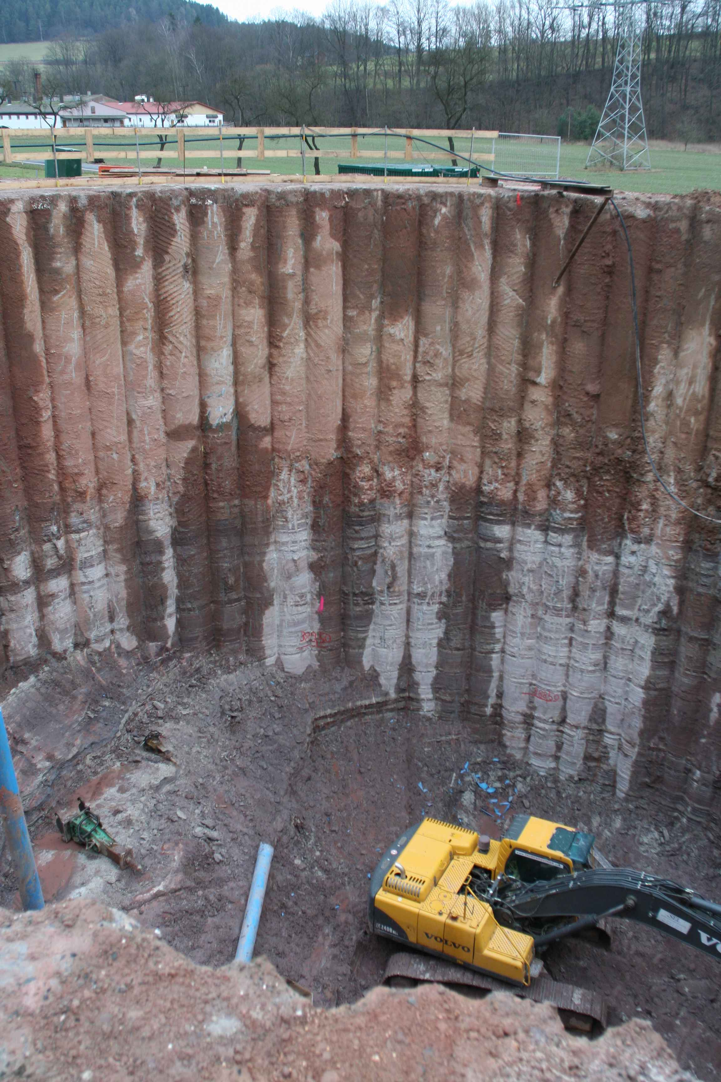 Grümpentalbrücke, Baugrube mit Bohrpfahlwand westliches Kämpferfundament